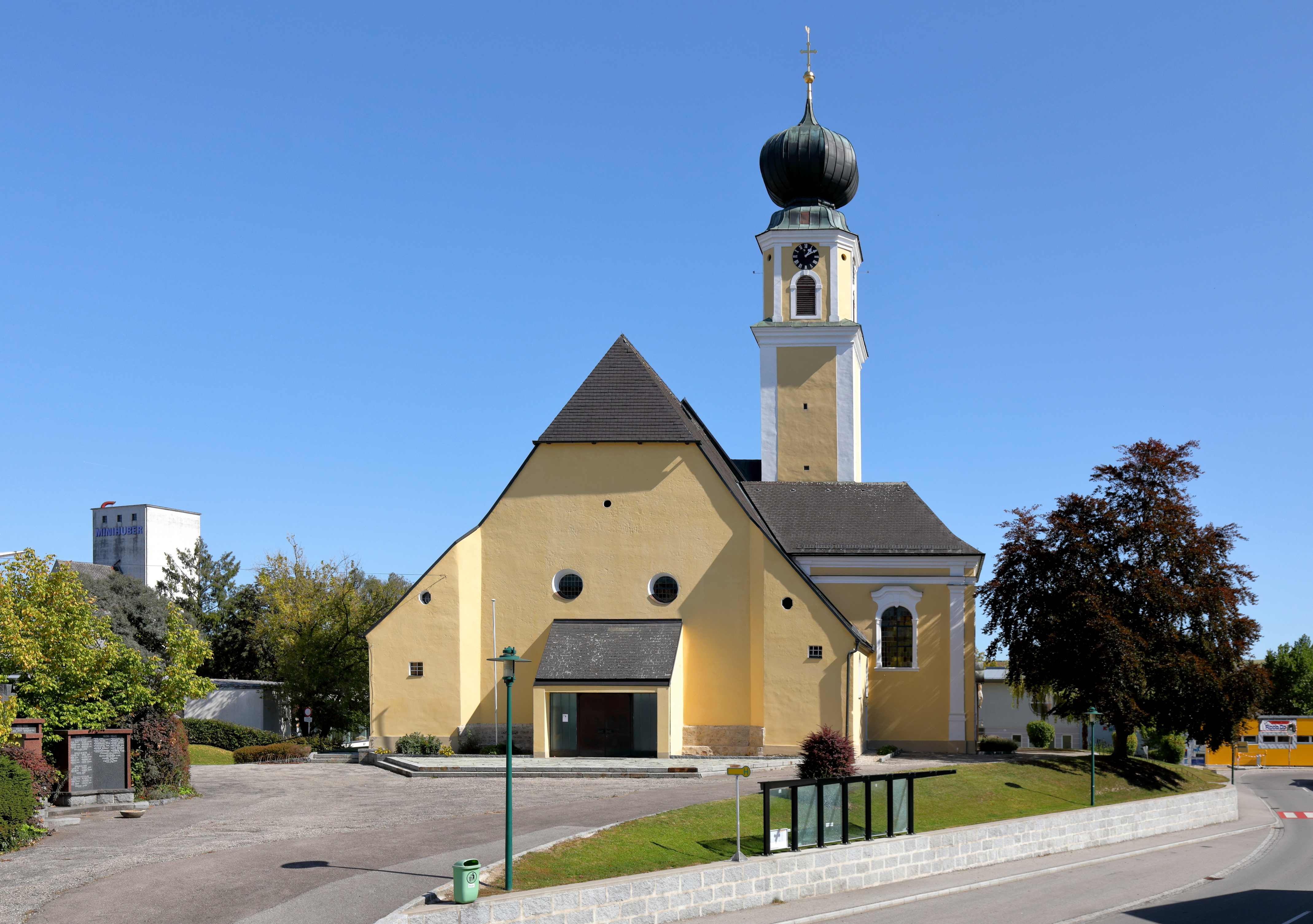 Westansicht der röm.-kath. Pfarrkirche hl. Mauritius in der oberösterreichischen Marktgemeinde Aurolzmünster.Ursprünglich eine spätgotische Kirche, die von 1729 bis 1735 im Barockstil aus- und umgebaut wurde. Der an der Südseite der Kirche angebaute Turm trug vor dem Brand im Jahre 1672 ein Spitzdach. 1718 wurde der Zwiebelhelm aufgebracht.